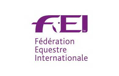 Protidopinška organizacija FEI